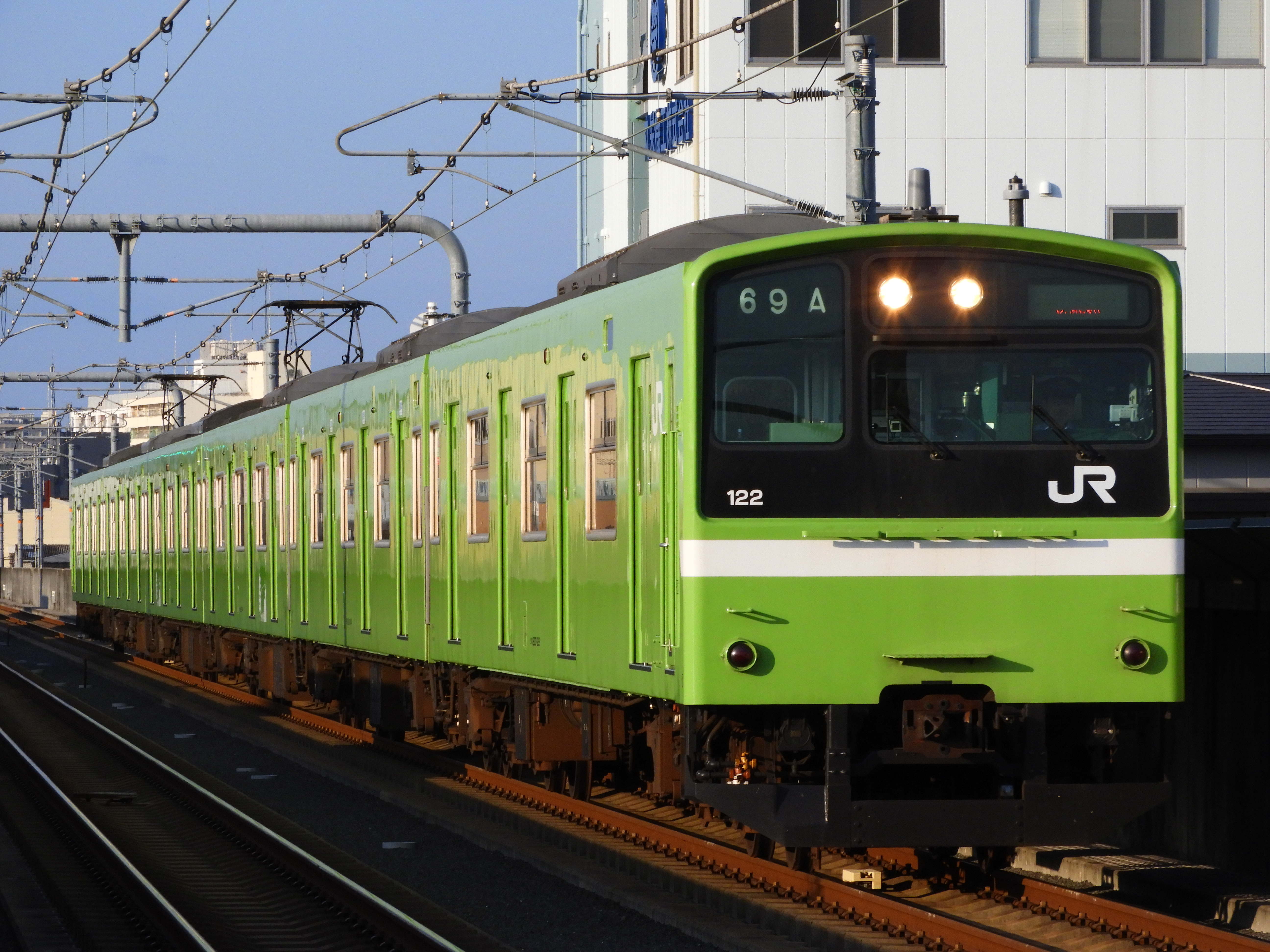 おおさか東線 201系の普通久宝寺行き 衣摺加美北駅にて。2019年10月5日